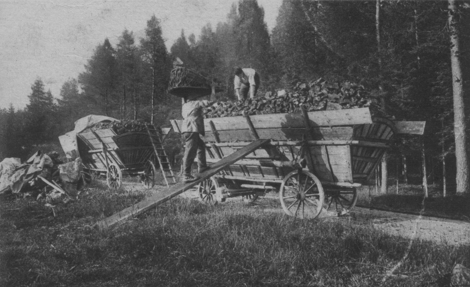 Fertig geladene 'Kohlwagen' (80-90 Zentner)